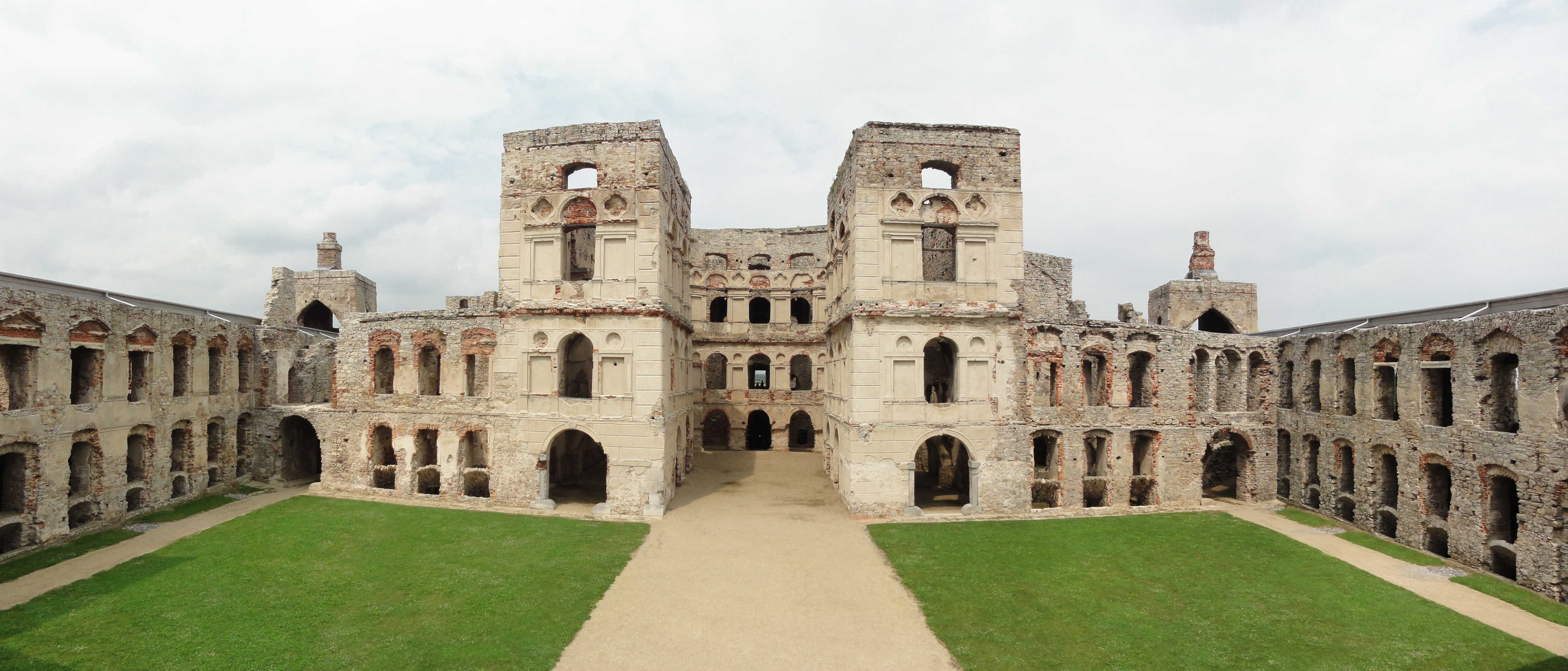 Ruiny zamku Krzyżtopór z XVII w. w Ujeździe, pow. opatowski, woj. świętokrzyskie, Polska. Zabytek prawnie chroniony.